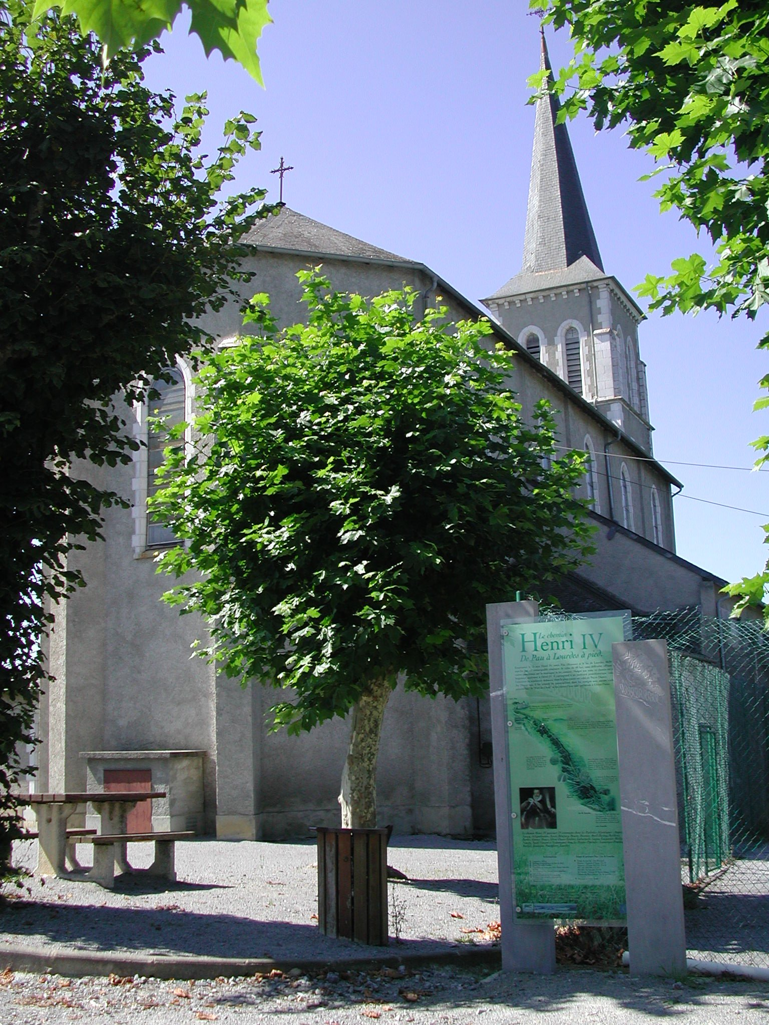 Espace aménagé consacré au chemin Henri IV à Saint-Vincent (France, 64)